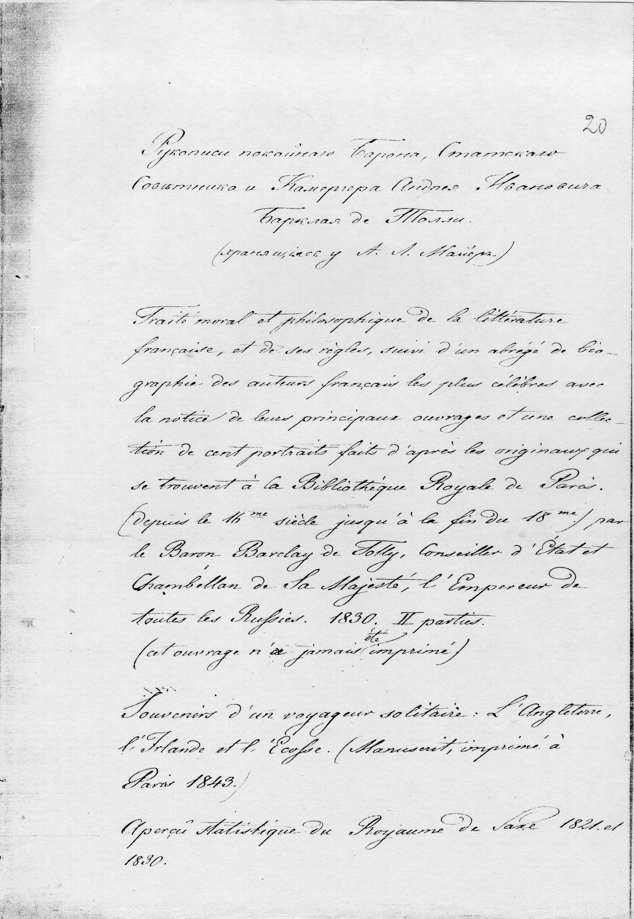 Рукописи покойного Барона Статского Советника и Камергера Андрея Ивановича Барклая де Толли (хранившихся у Майера) 1821, 1830